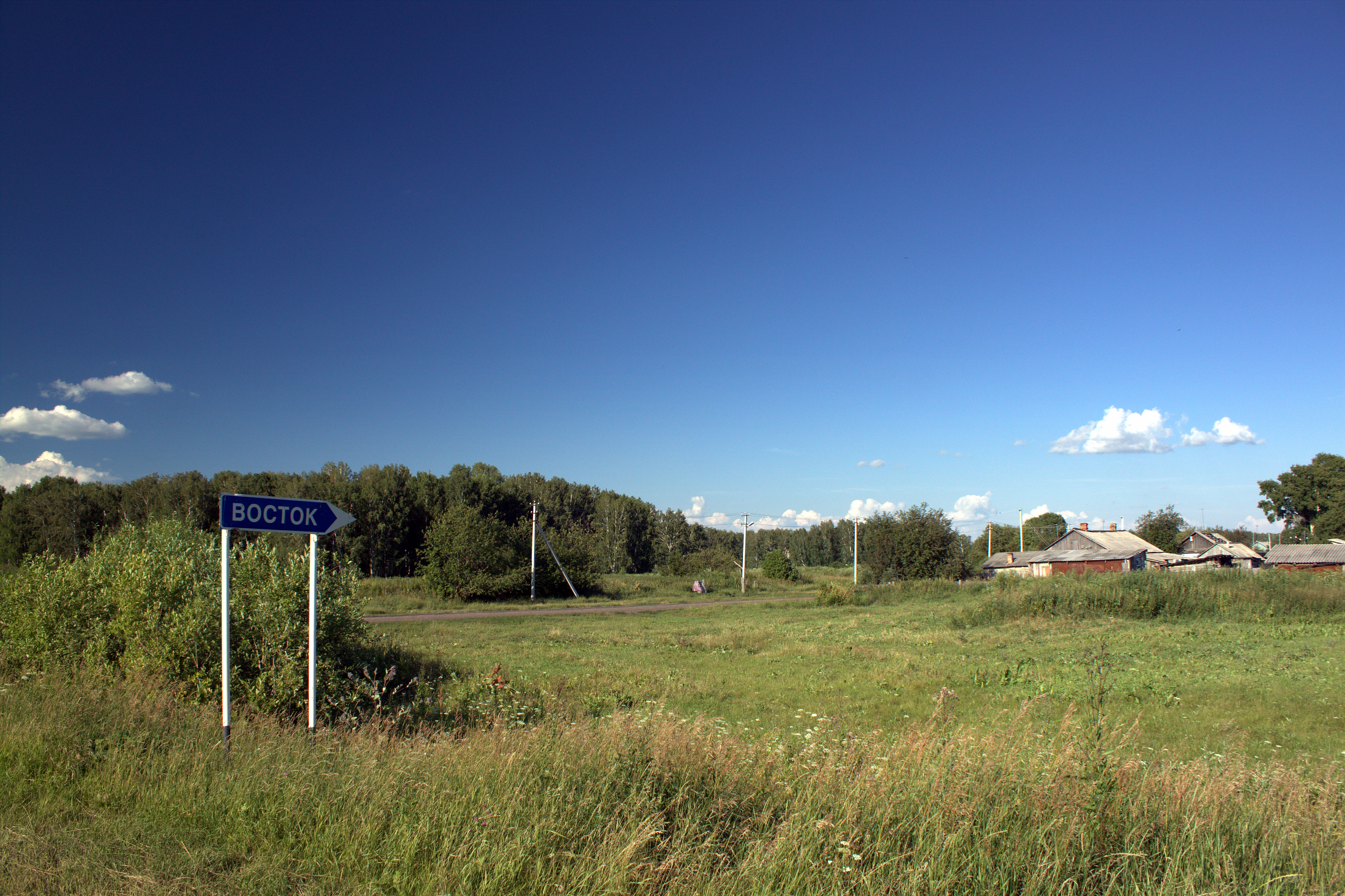 посёлок Восток, Абатский район, Тюменская область.